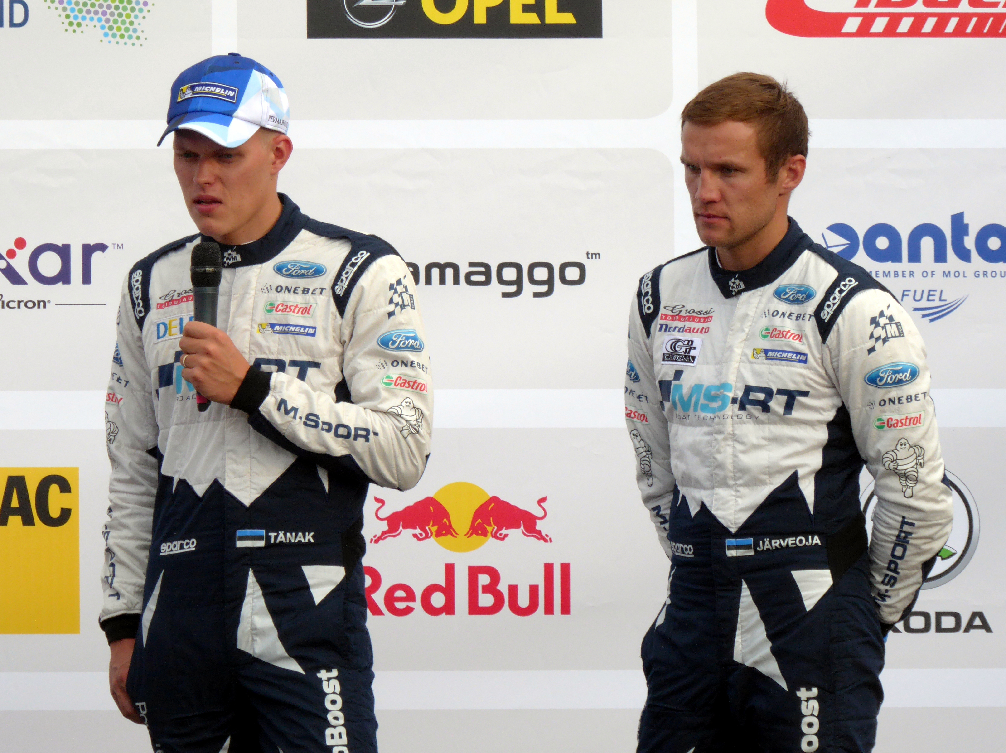 Rallye Deutschland 2017, Eröffnungszeremonie auf dem Tbilisser Platz in Saarbrücken